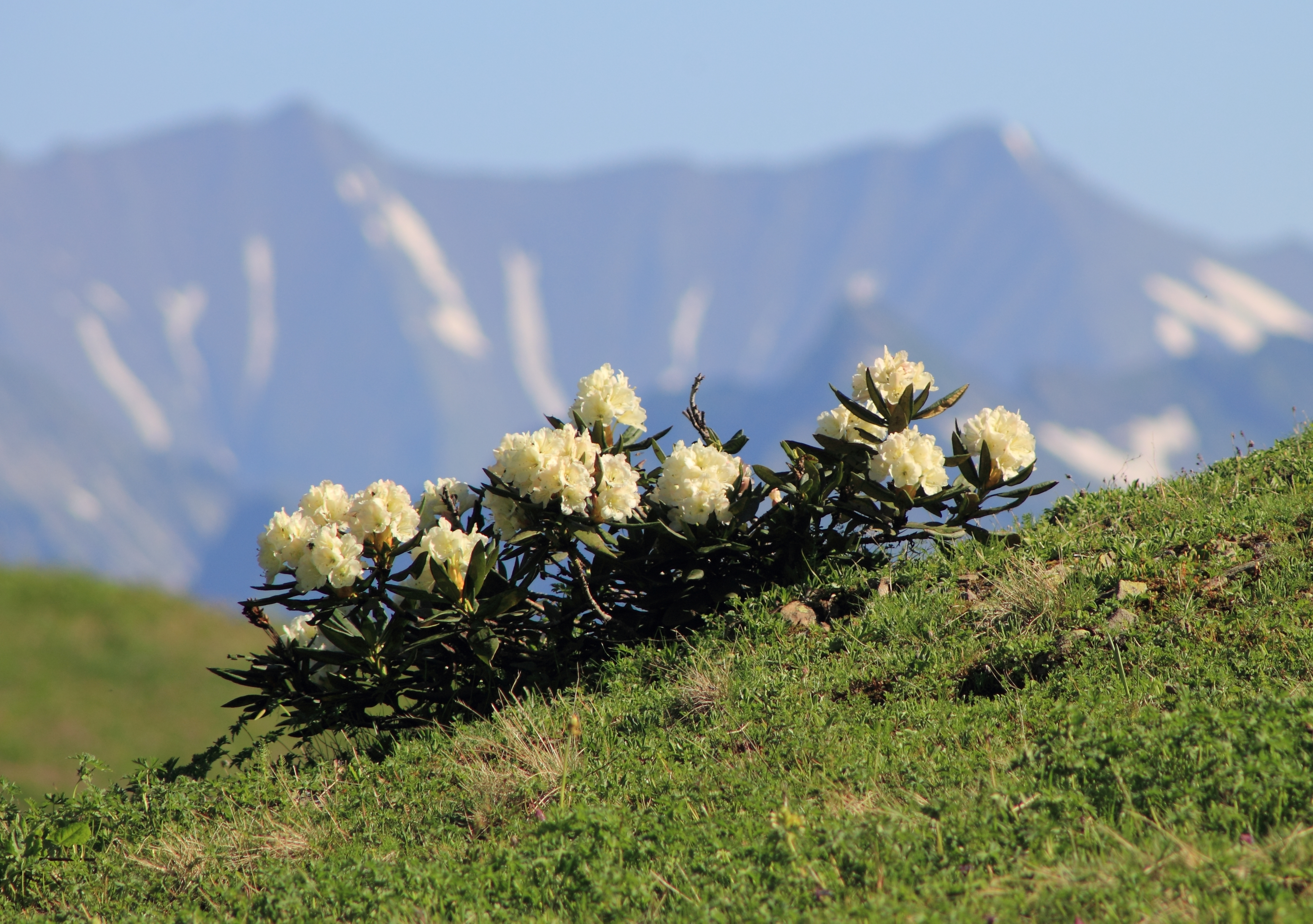 Цветущий рододендрон. Сочинский национальный парк: Сочинский национальный парк расположен на южном склоне Большого Кавказа в Краснодарском крае. Земли СНП размещены на территории Адлерского, Хостинского и Лазаревского районов г.Сочи. Территория СНП разделена на 2 отдельных участка Лооским экспериментально-показательным лесхозом,Сочи, Краснодарский край This image is related to the protected area of Russia number 2300430